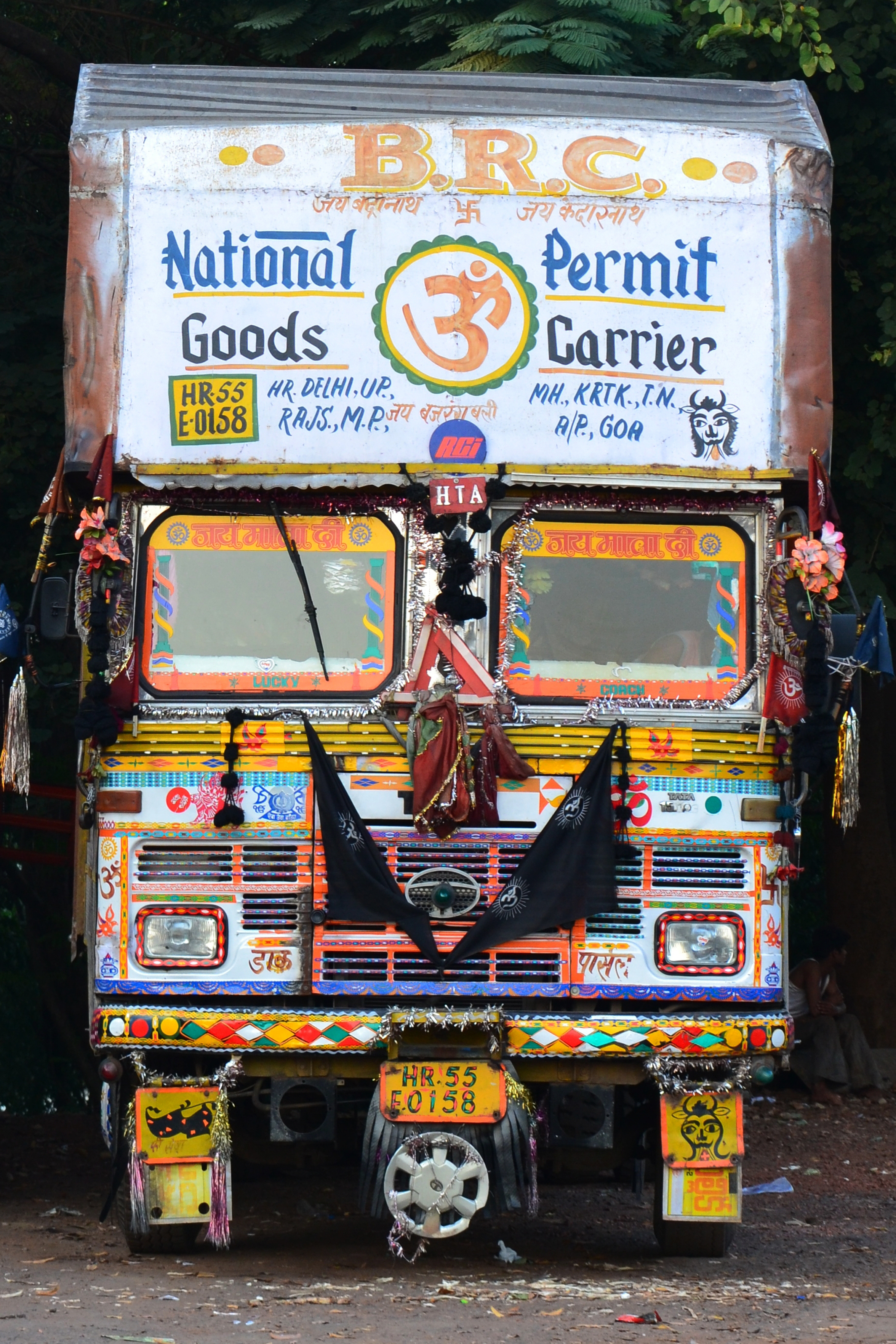 pimp my truck;)